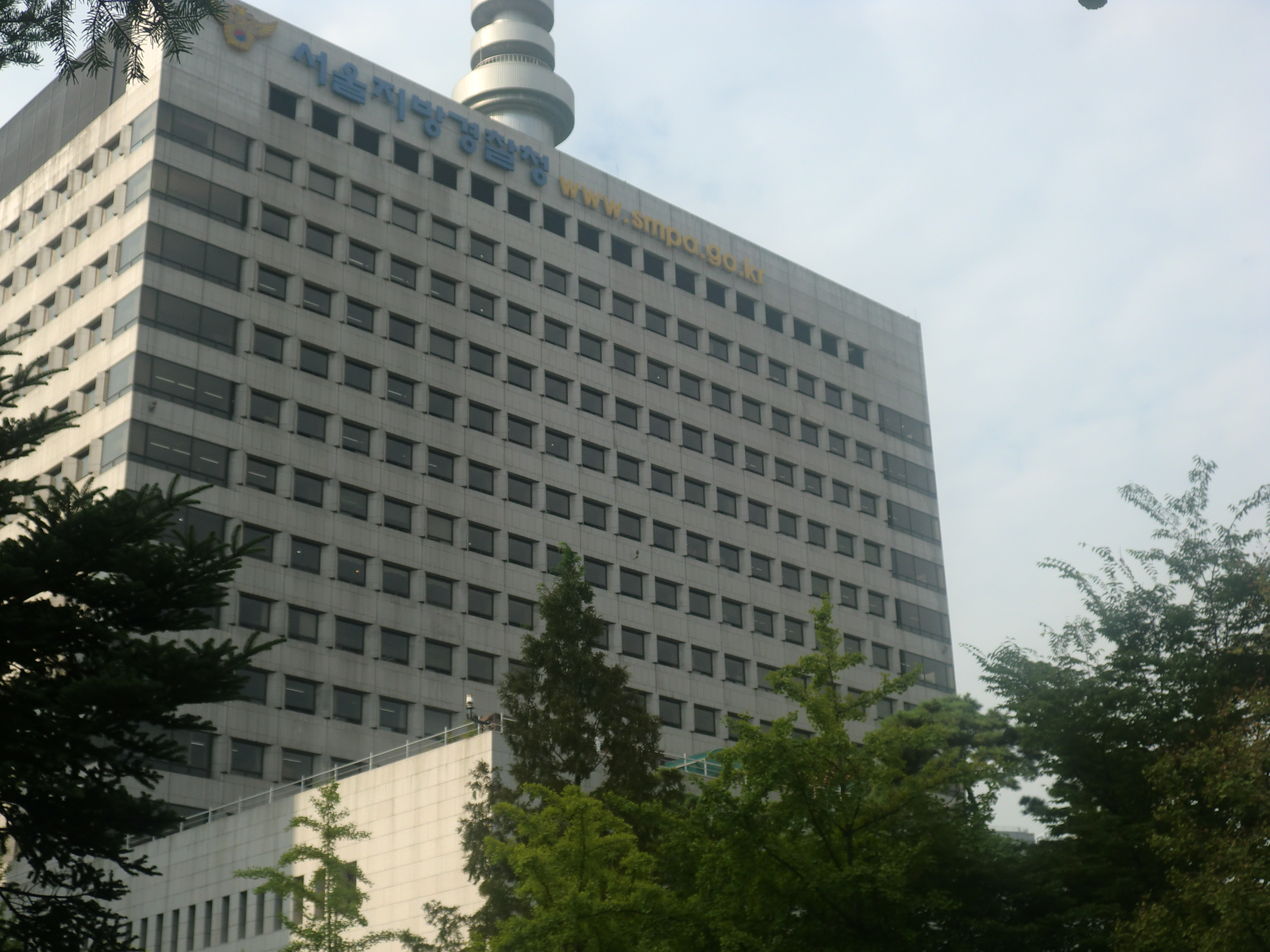 서울지방경찰청